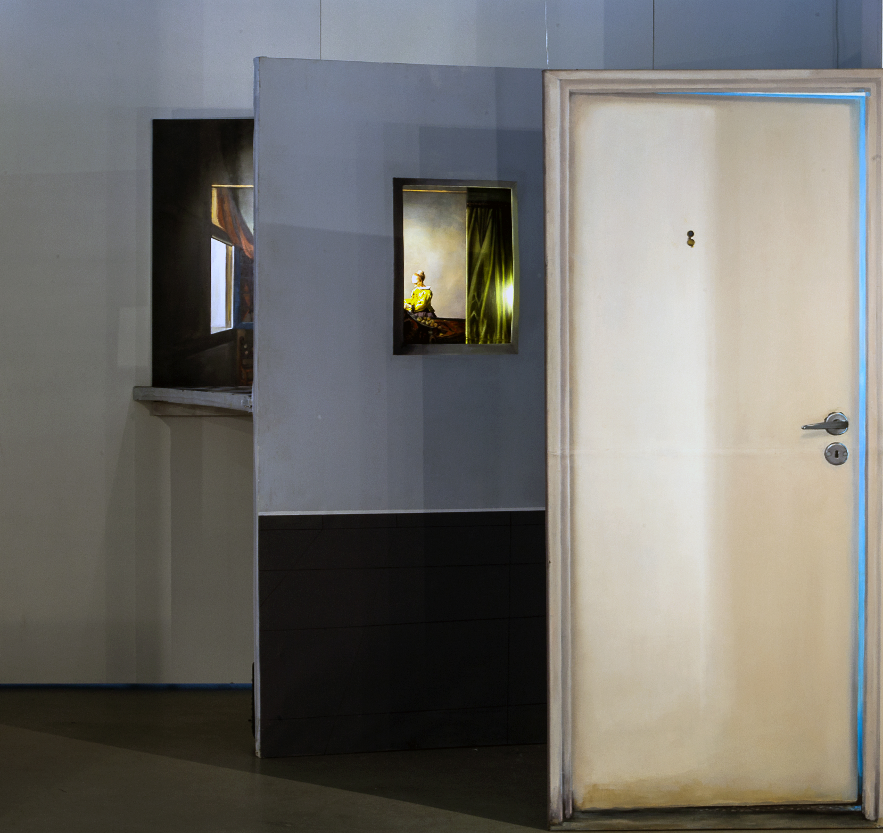 Dziewczyna czytająca list - Instalacja. Scenografia i lalka do filmu animowanego. "Prime Time 2013". Wystawa najlepszych dyplomów Muzeum Włókiennictwa, Łódź styczeń - marzec 2014 r.